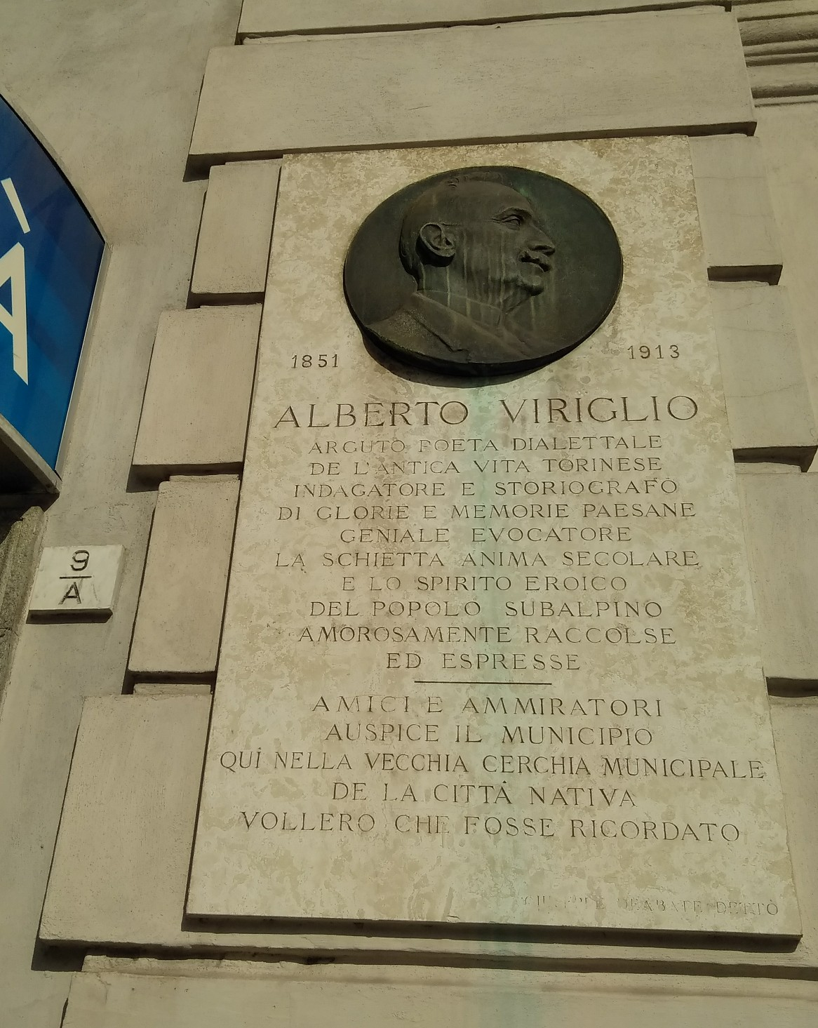 Alberto Viriglio - lapide a Torino, piazza Palazzo di Città